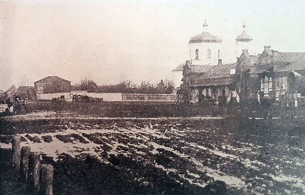 Беларуская (тарашкевіца): Клімавічы (Klimavičy), пляц Рынак (plac Rynak). Царква